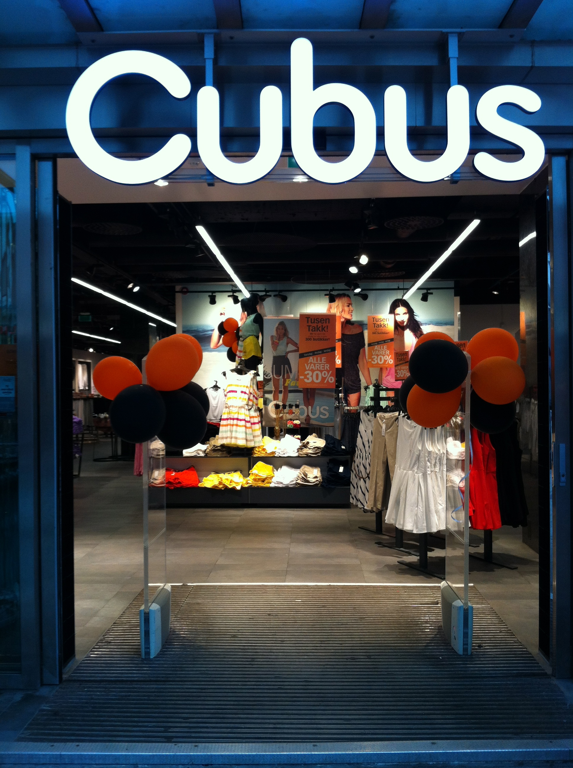 CUBUS Flagship Store, Karl Johan st.